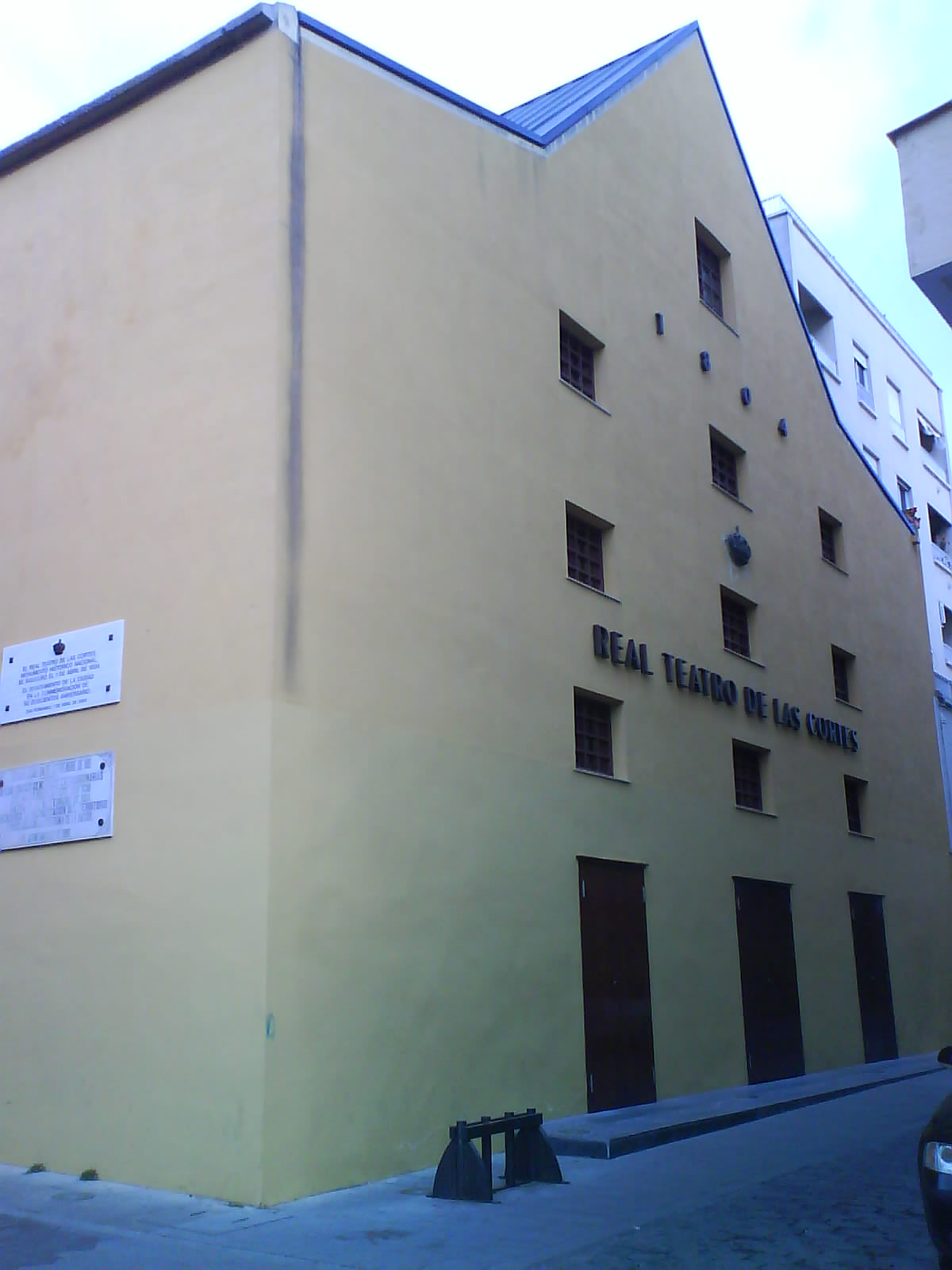 Fachada del Real Teatro de las Cortes, San Fernando (Cádiz).